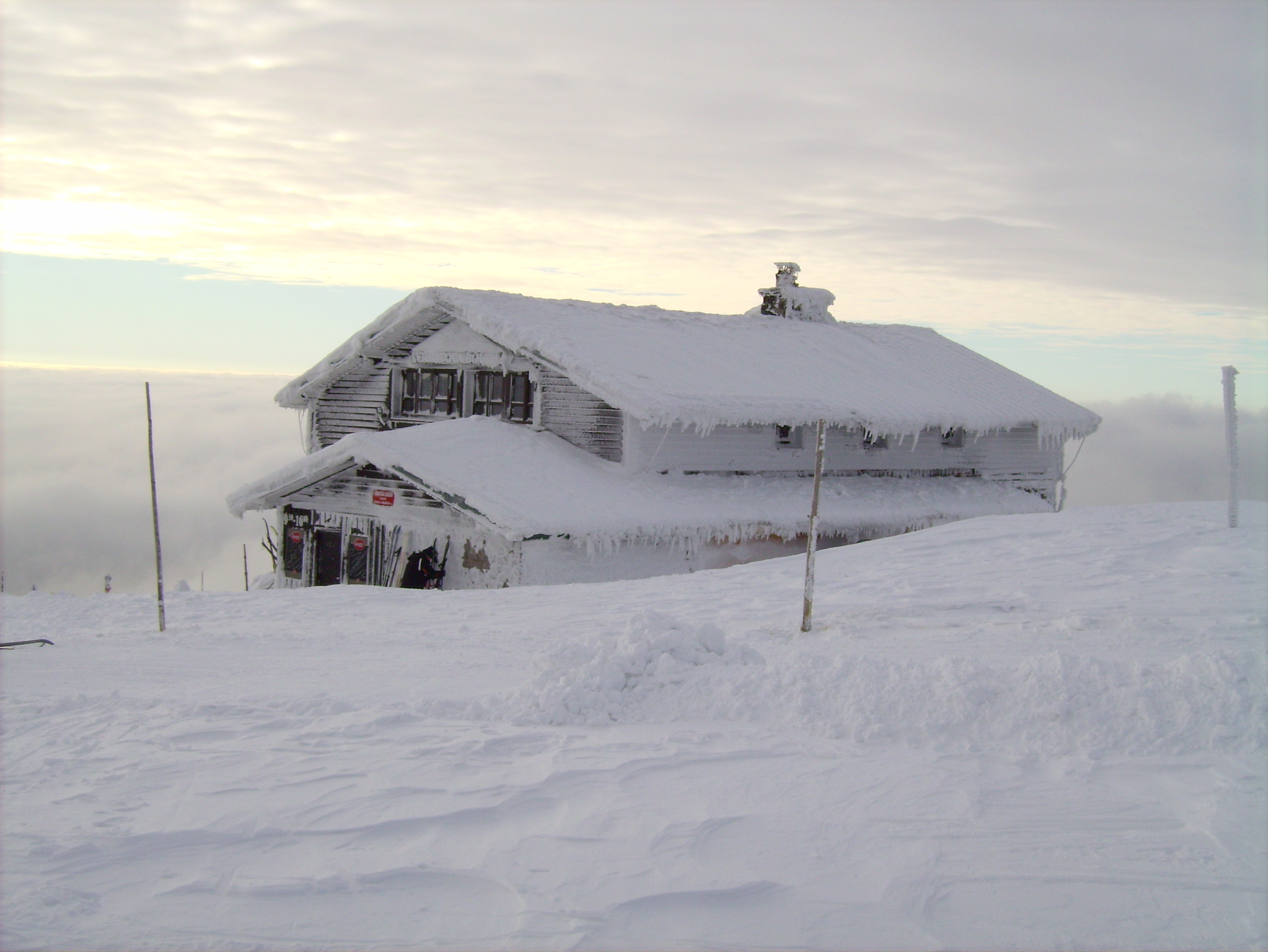 Vrbata-Baude im Winter